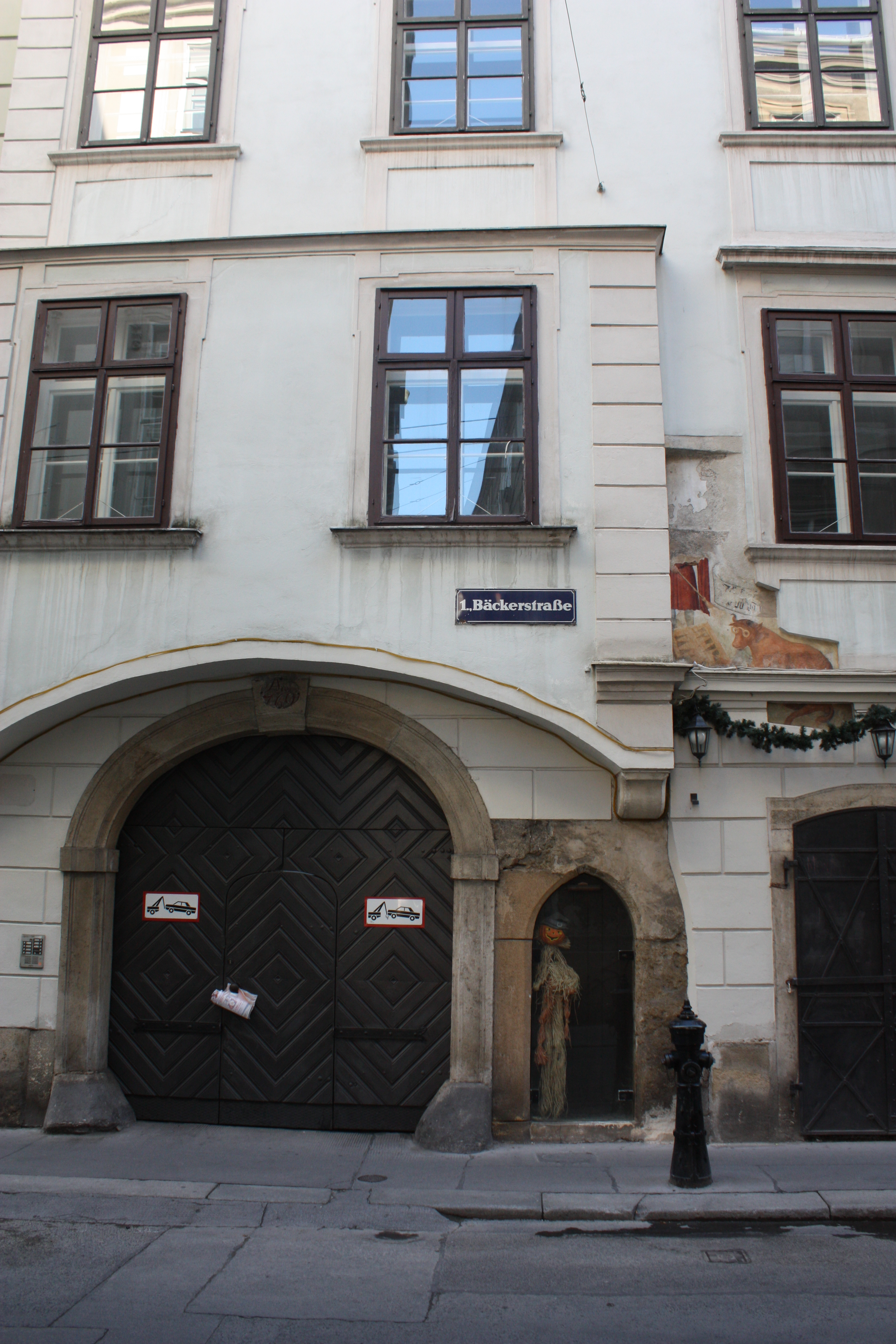 Zentrum, Vienna, Wien